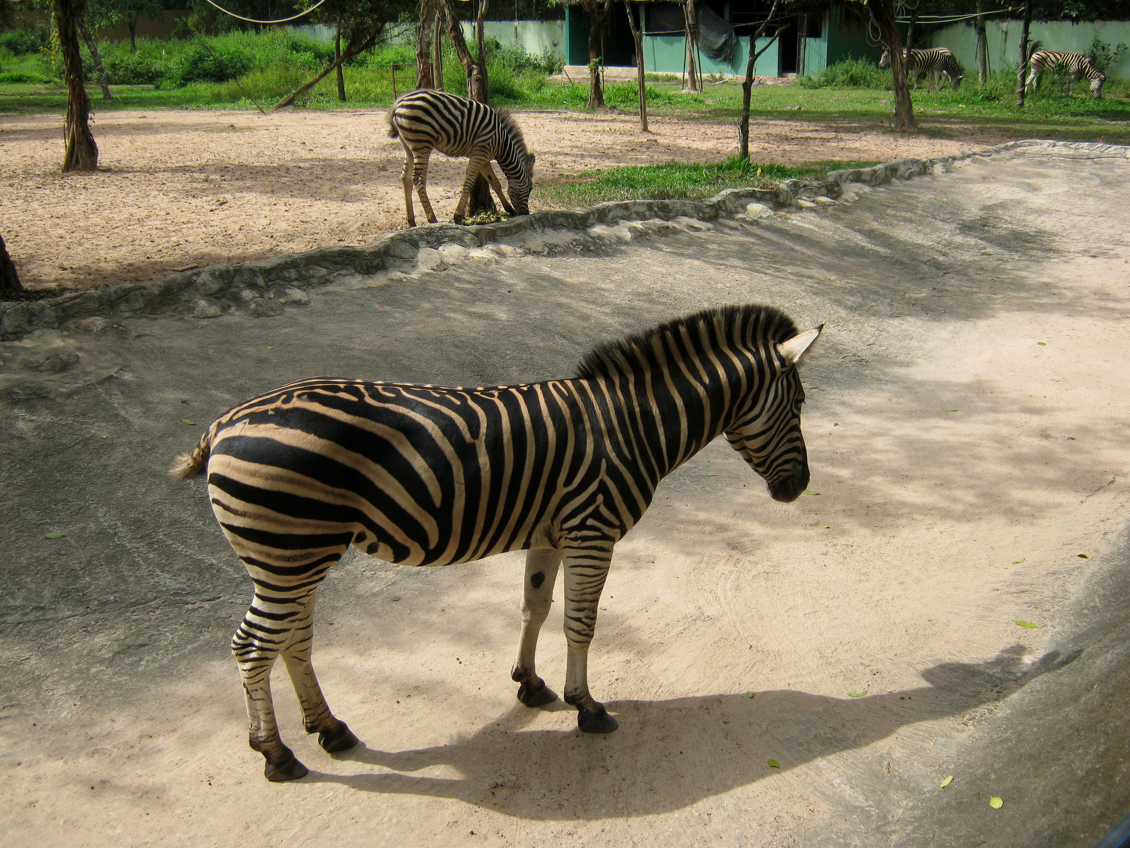 Ngựa vằn được nuôi trong Khu du lịch Đại Nam, thuộc tỉnh Bình Dương, Việt Nam.